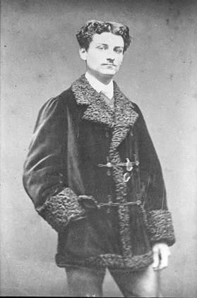 Petar Karadjordjevic, snimljeno 1865. Nepoznati fotograf, slabe sanse da je ziveo pre 70 godina.